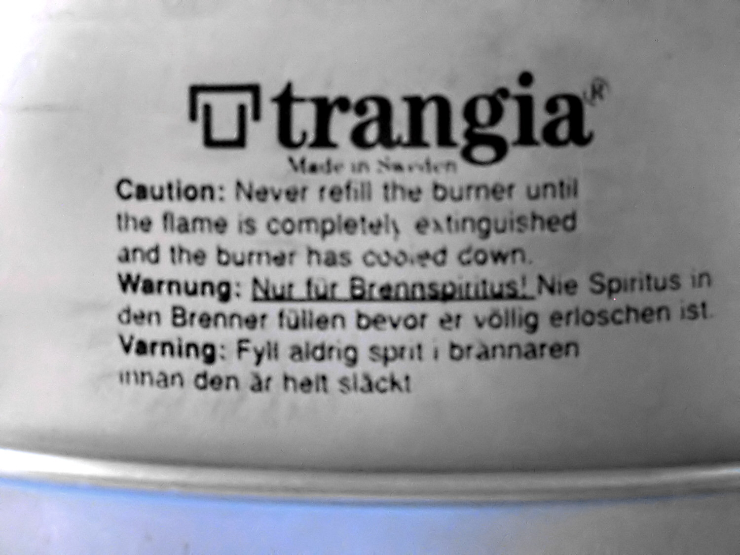 Trangia Detailaufnahme (Warnhinweis)